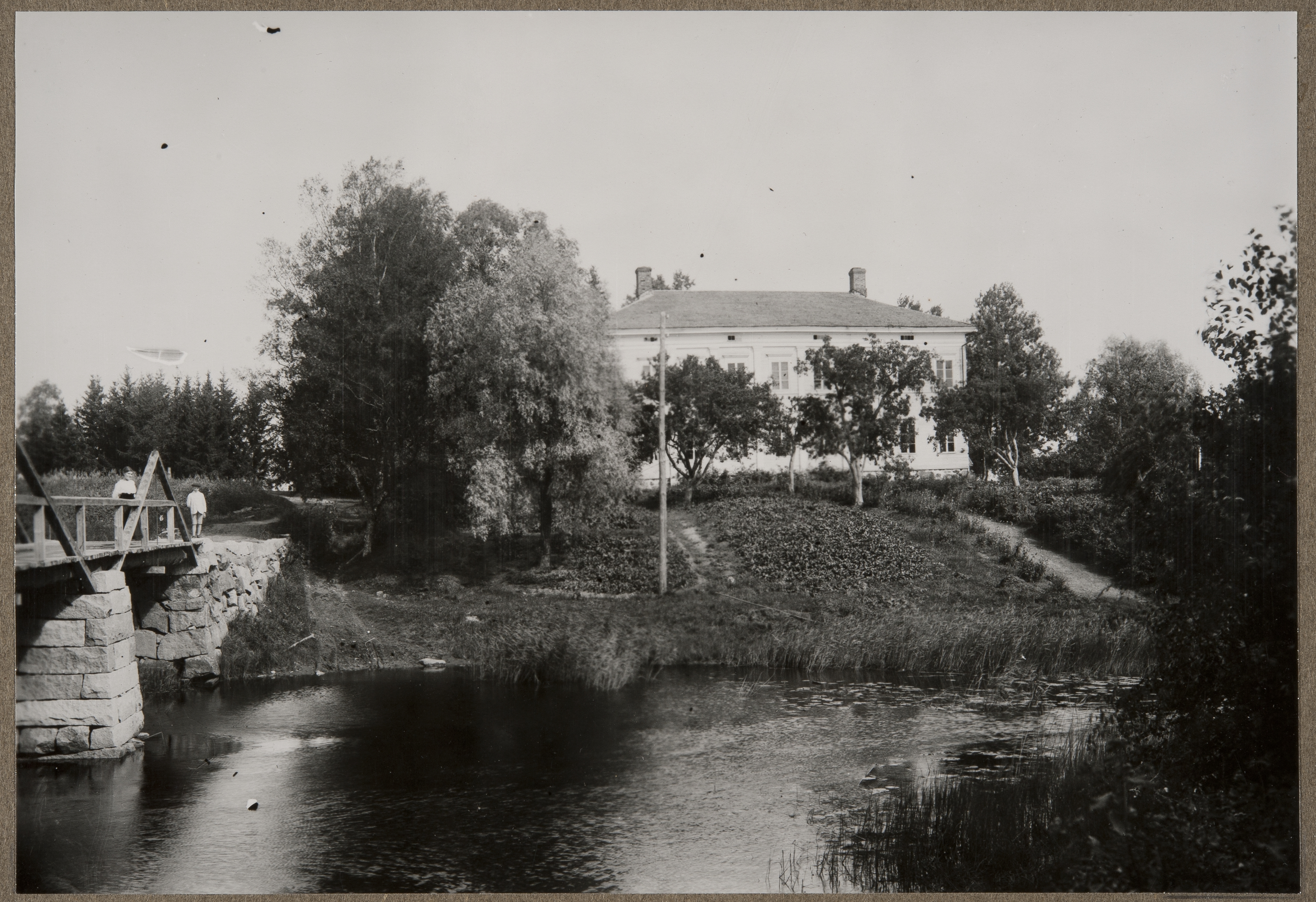 Ravean kartano Mietoisissa